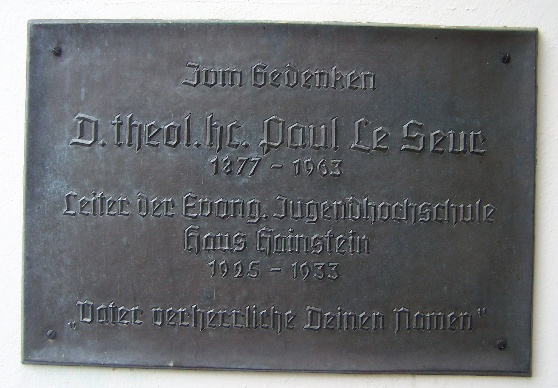 Gedenktafel für Paul Le Seur an der Kapelle beim Hotel Haus Hainstein in Eisenach.